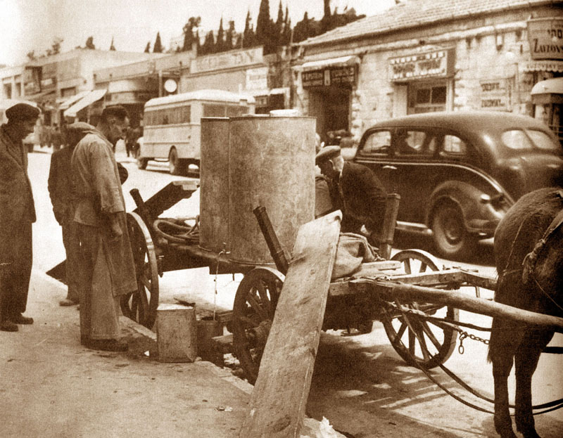 חלוקת מים בירושלים בעתהמצור